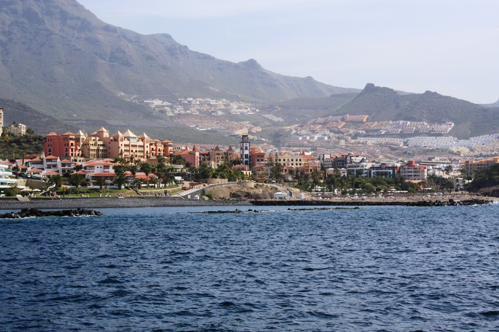 Vista de Costa Adeje desde el mar